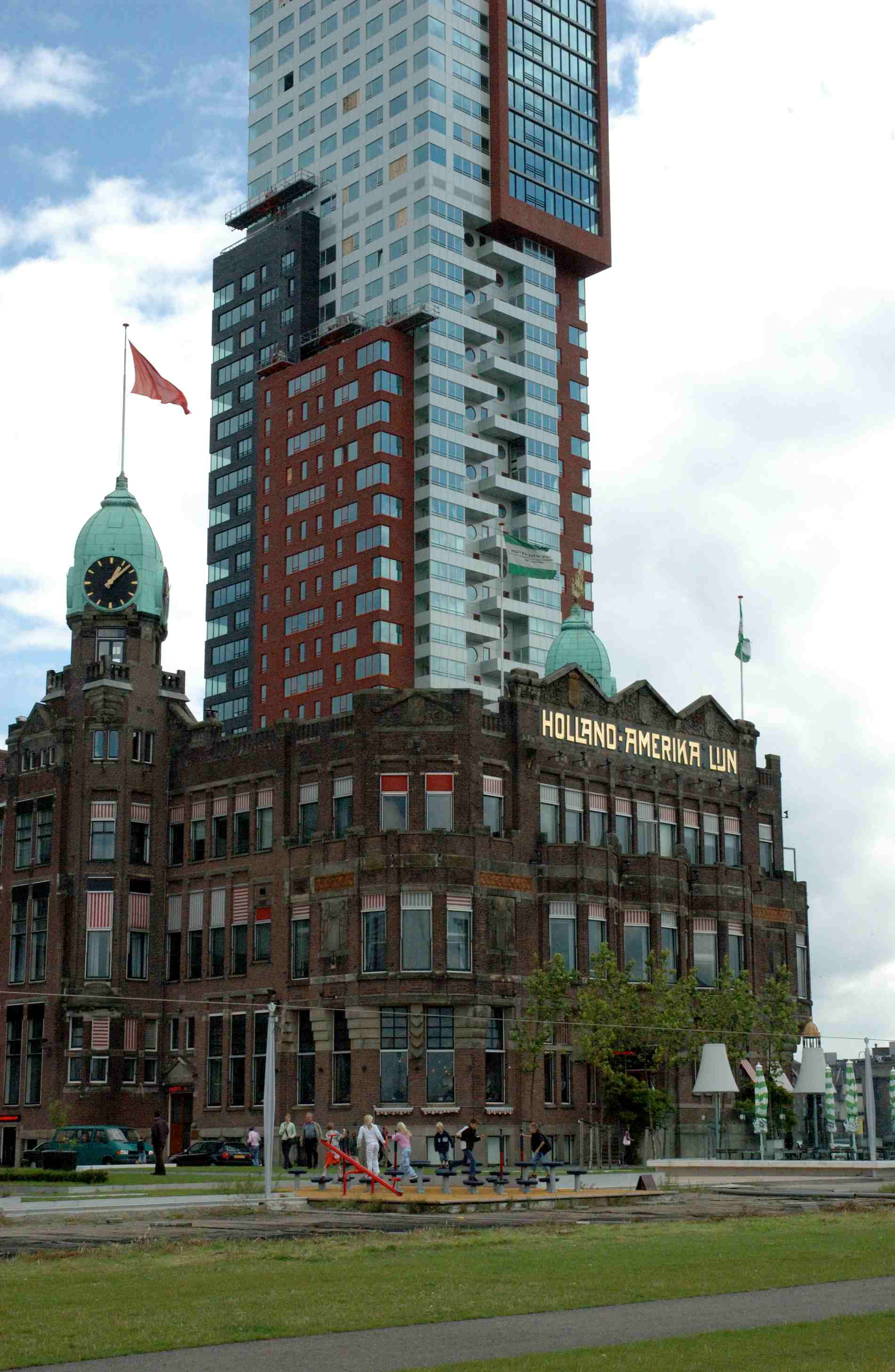 Hotel New York Rotterdam, voormalig Hoofdkantoor Holland-Amerika-Lijn